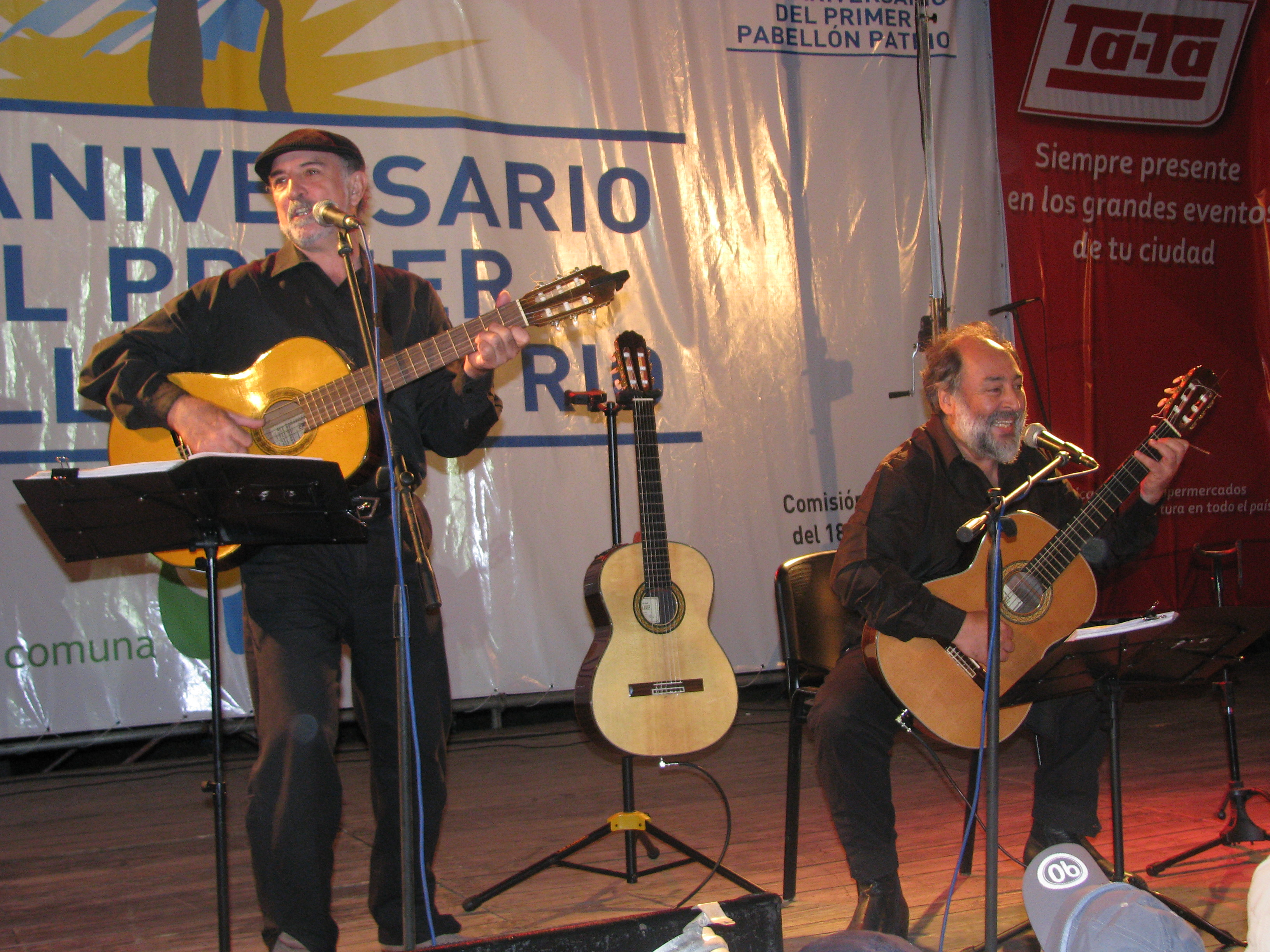 Dúo de música uruguayo Larbanois & Carrero